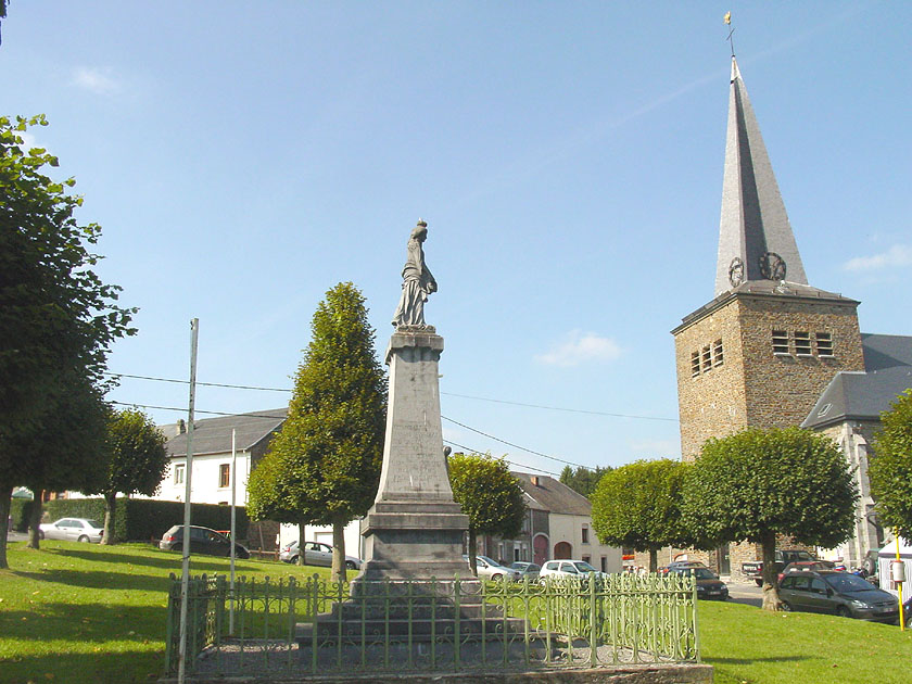 Willerzie village green and church